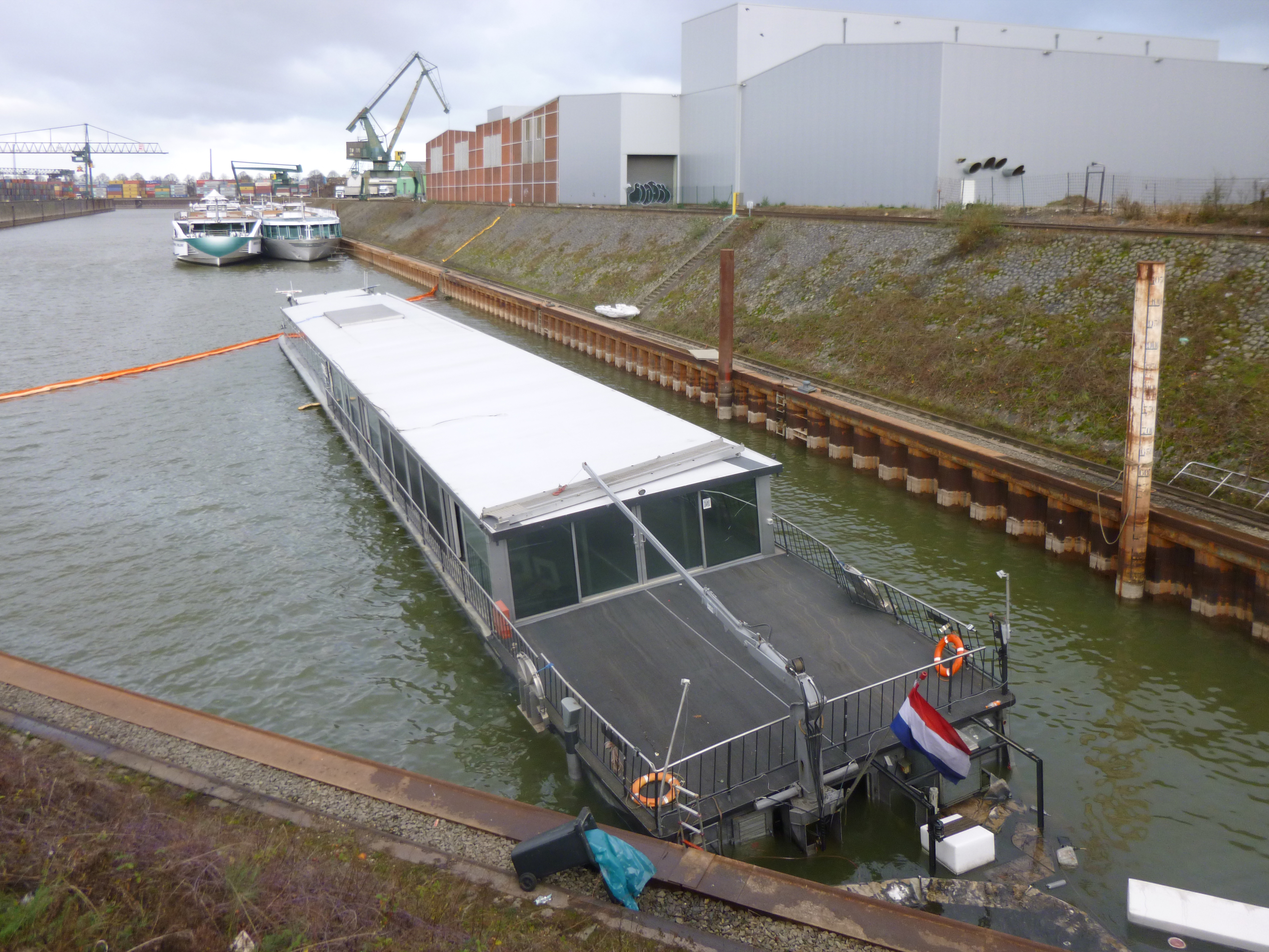 Am 25.12.2018 gesunkenes Schiff Pure-Liner 2 im Becken 3 des Hafens Köln-Niehl I; rechts der leere Liegeplatz des Schwesterschiffs Pure-Liner 1